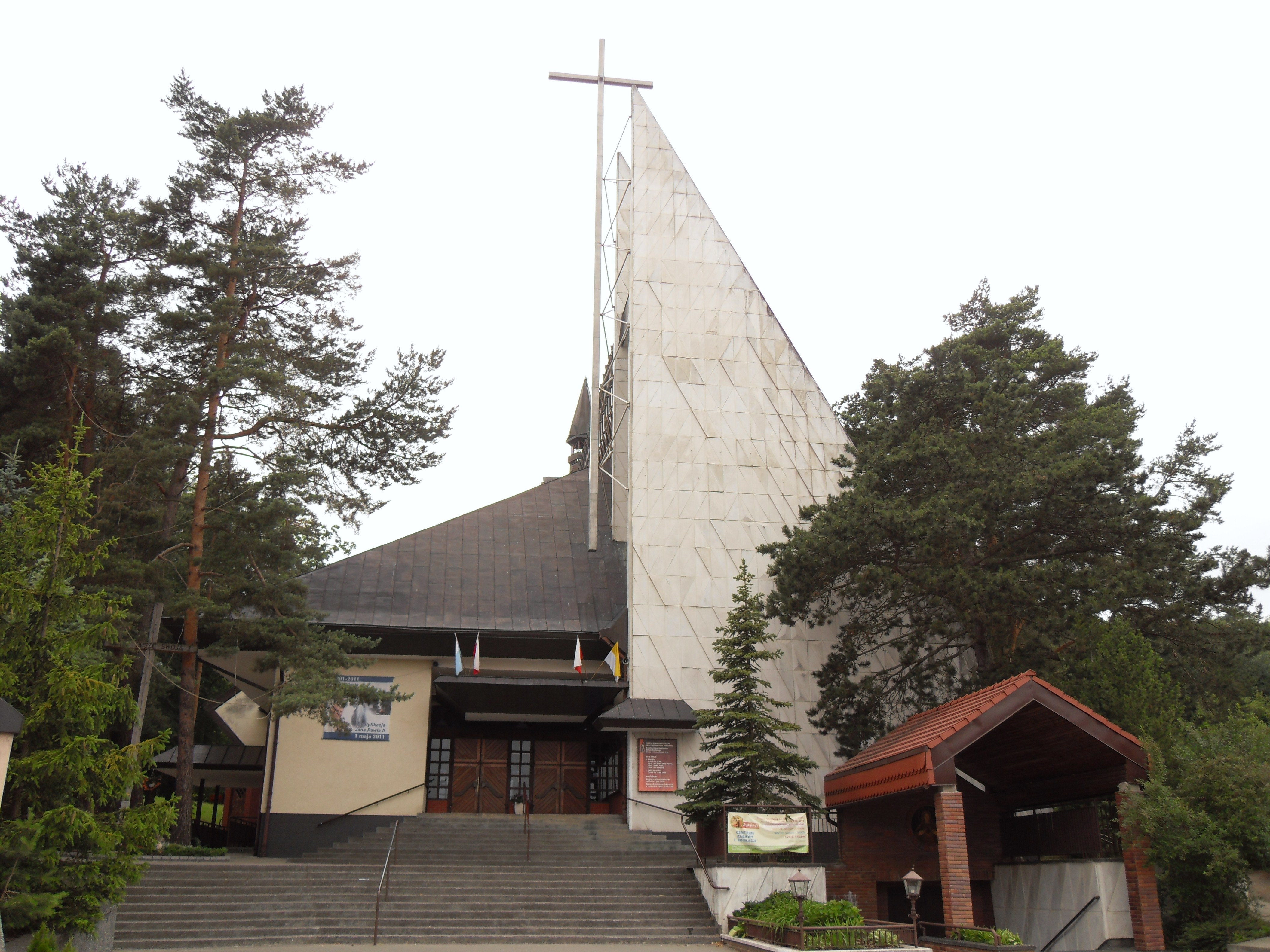 Gdańsk Strzyża, ul. Gomółki 11/13 - rzymskokatolicki kościół parafialny pw. Zmartwychwstania Pańskiego.